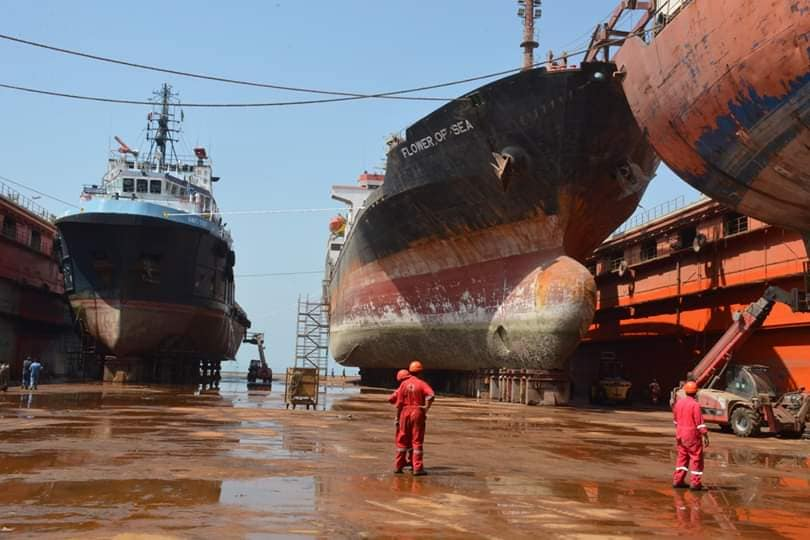 بعض السفن بالميناء